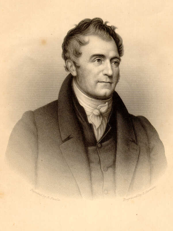 portrait of Eleuthère Irénée du Pont